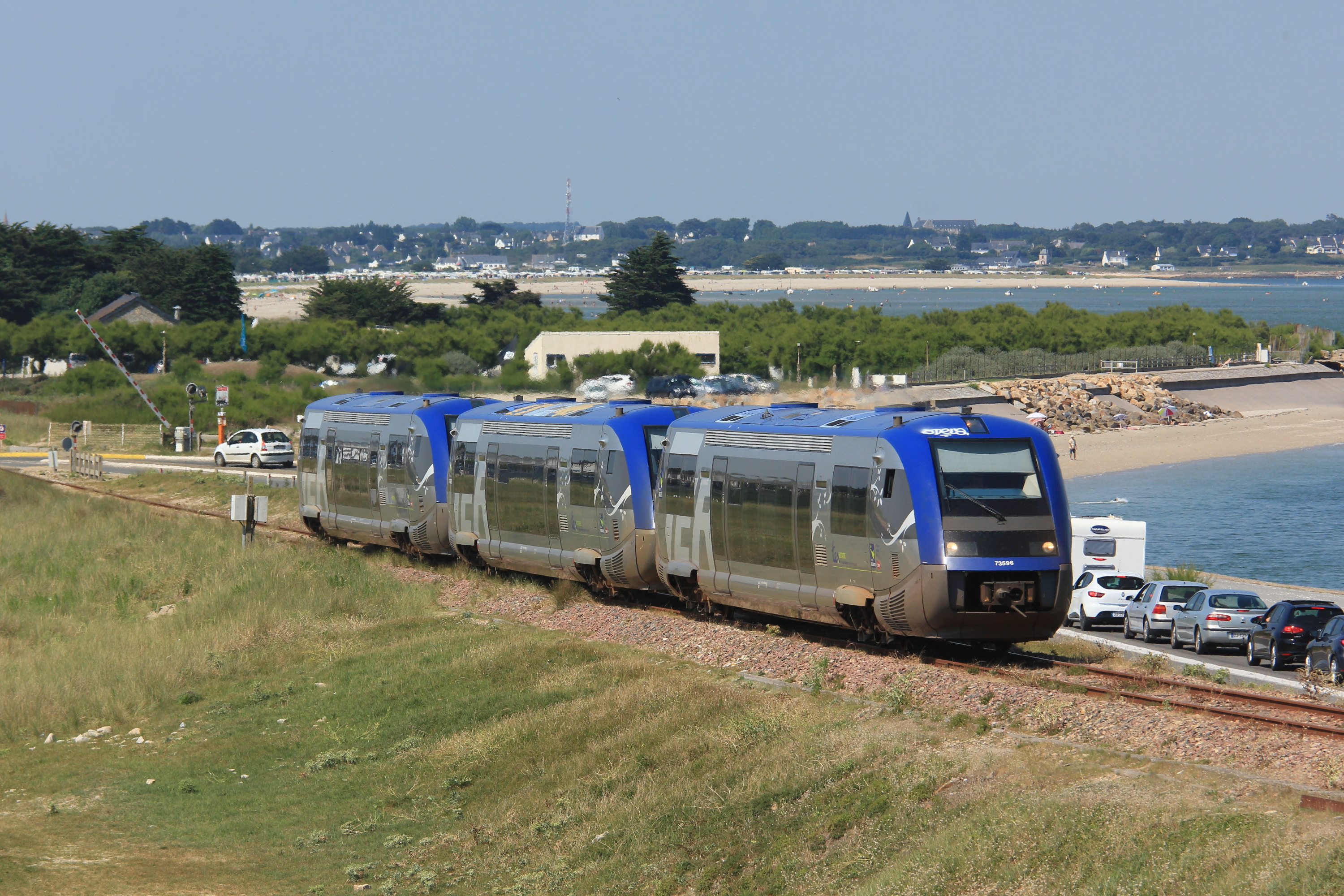 Les X 73596, 73604 et 73522 assurant le TER « tire-bouchon » n°854559 entre Auray et Quiberon viennent de franchir l'Isthme de Penthièvre, en redémarrant de la halte de l'Isthme.